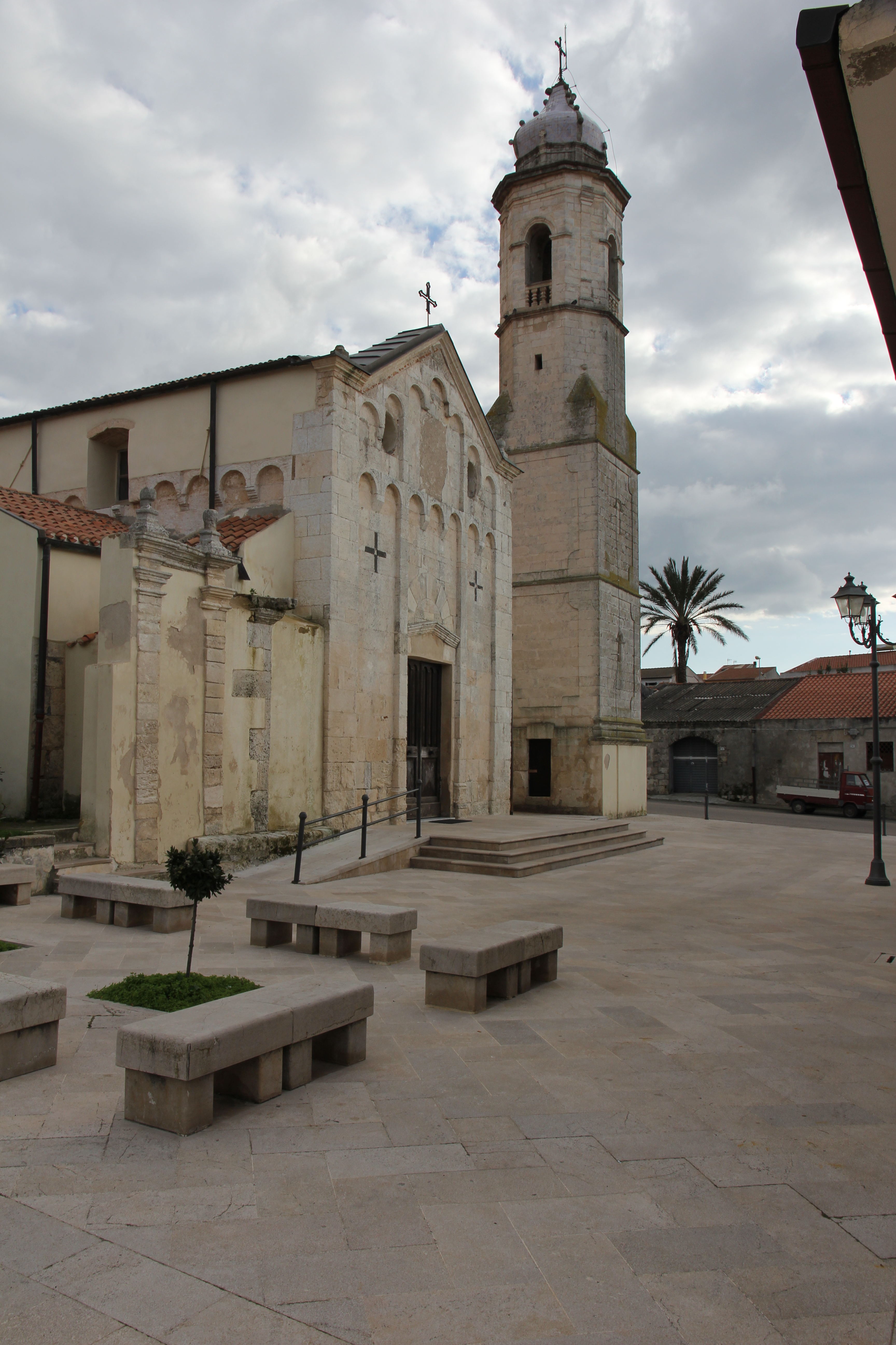 Tissi - Chiesa di Santa Anastasia